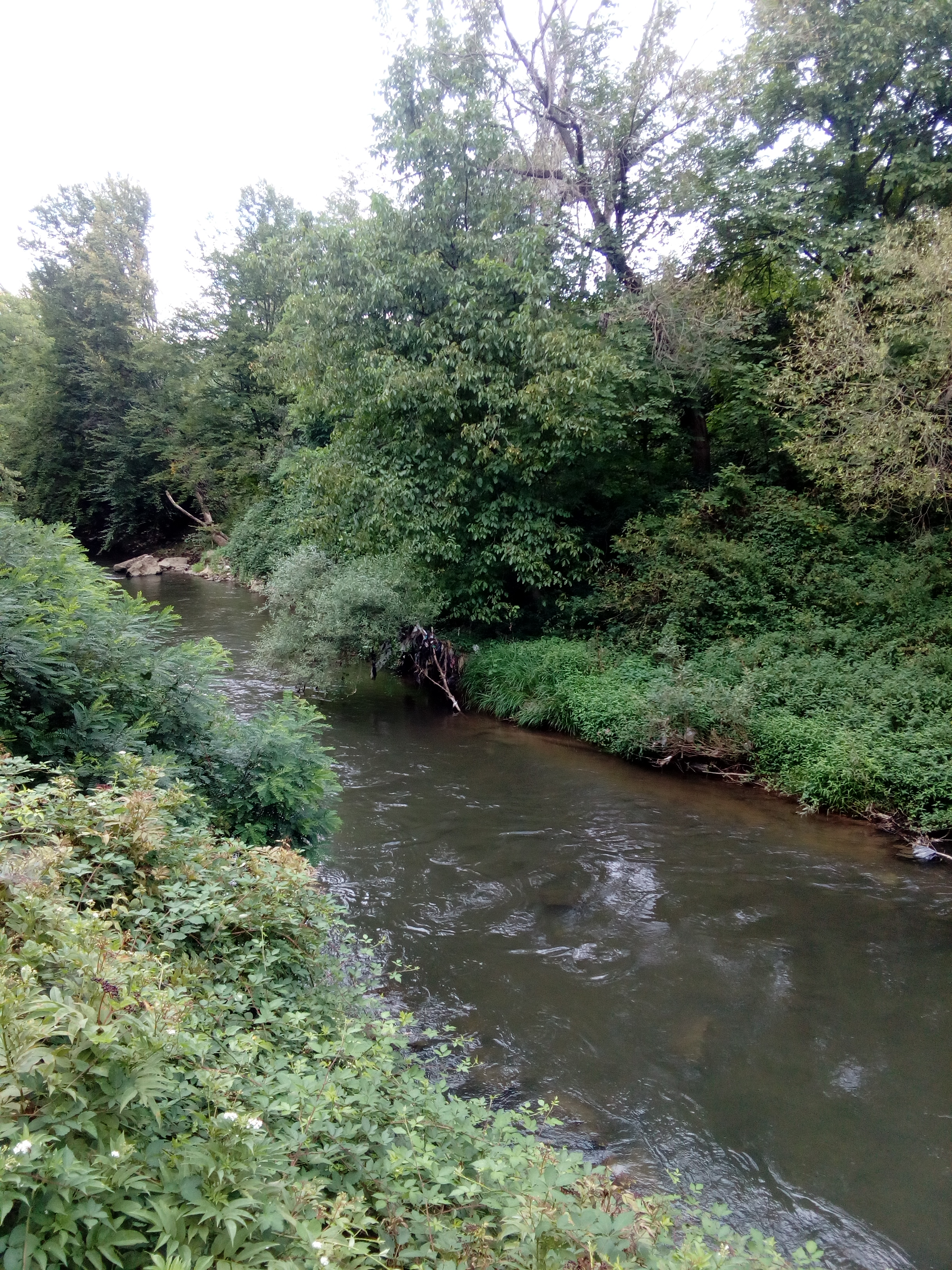 Близо до с.Български извор